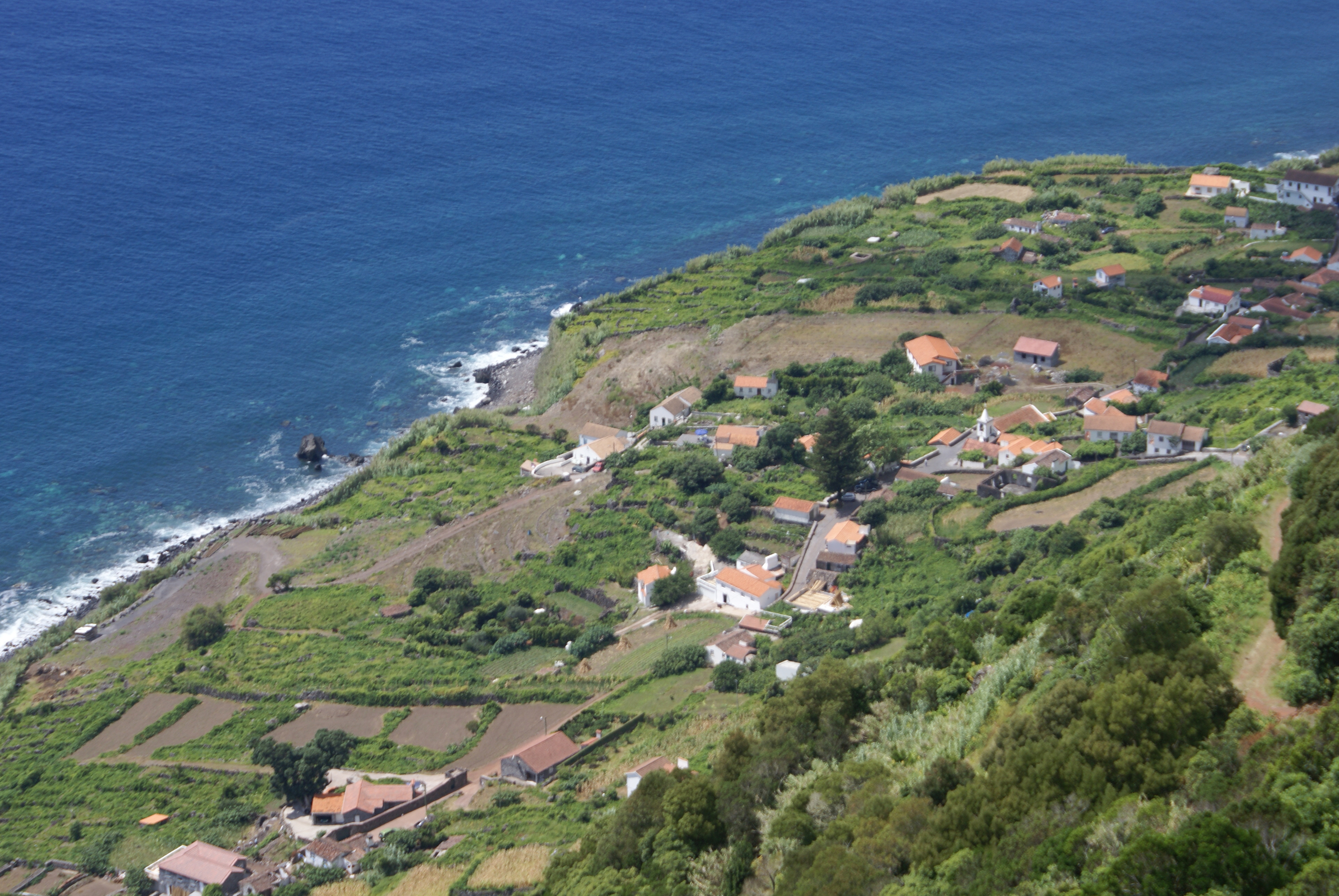 Fajã de São João, vista, Calheta, São Jorge, Açores